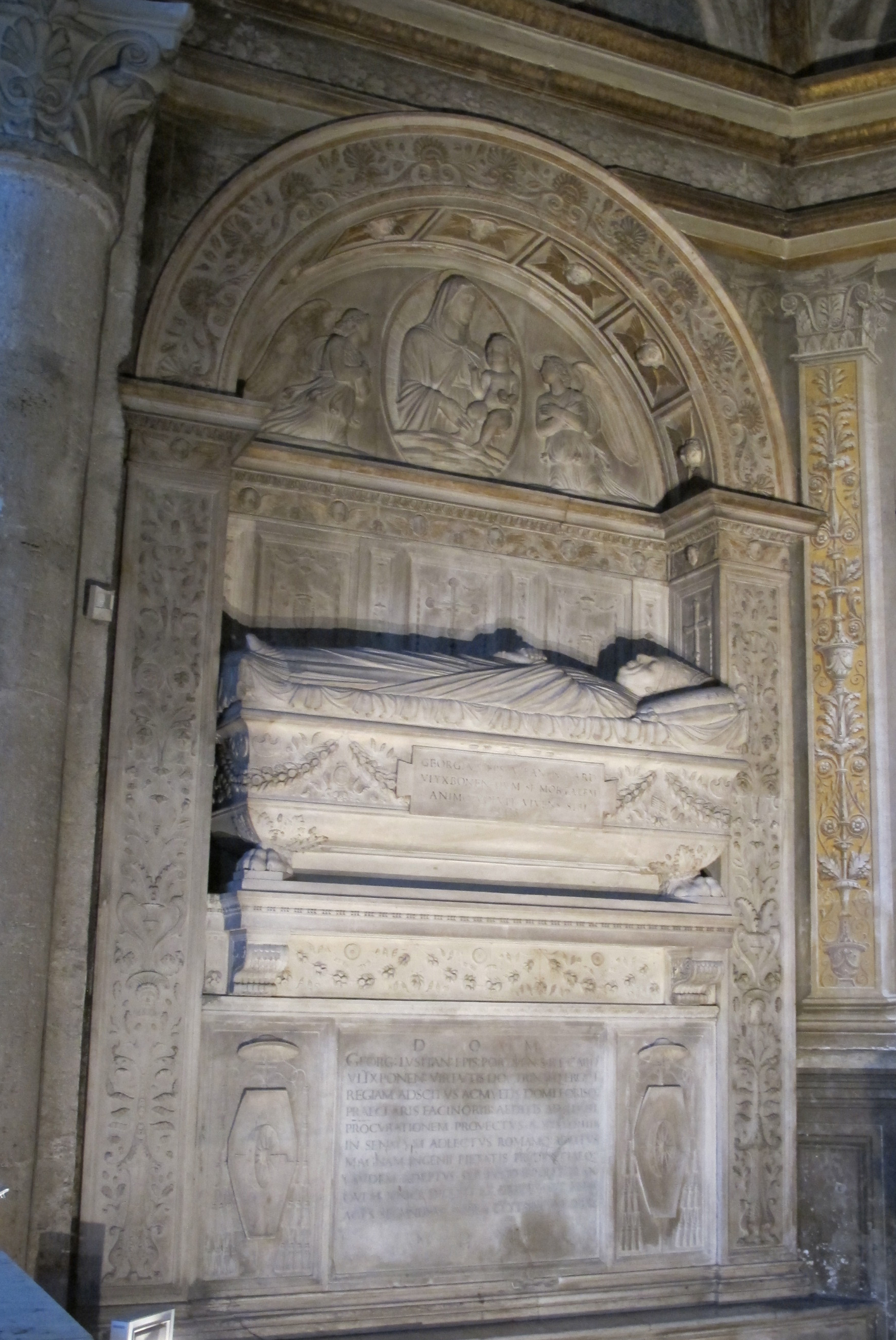 Cappella costa, scuola di a. bregno, monum al cardinale giorgio costa, 1508 ca